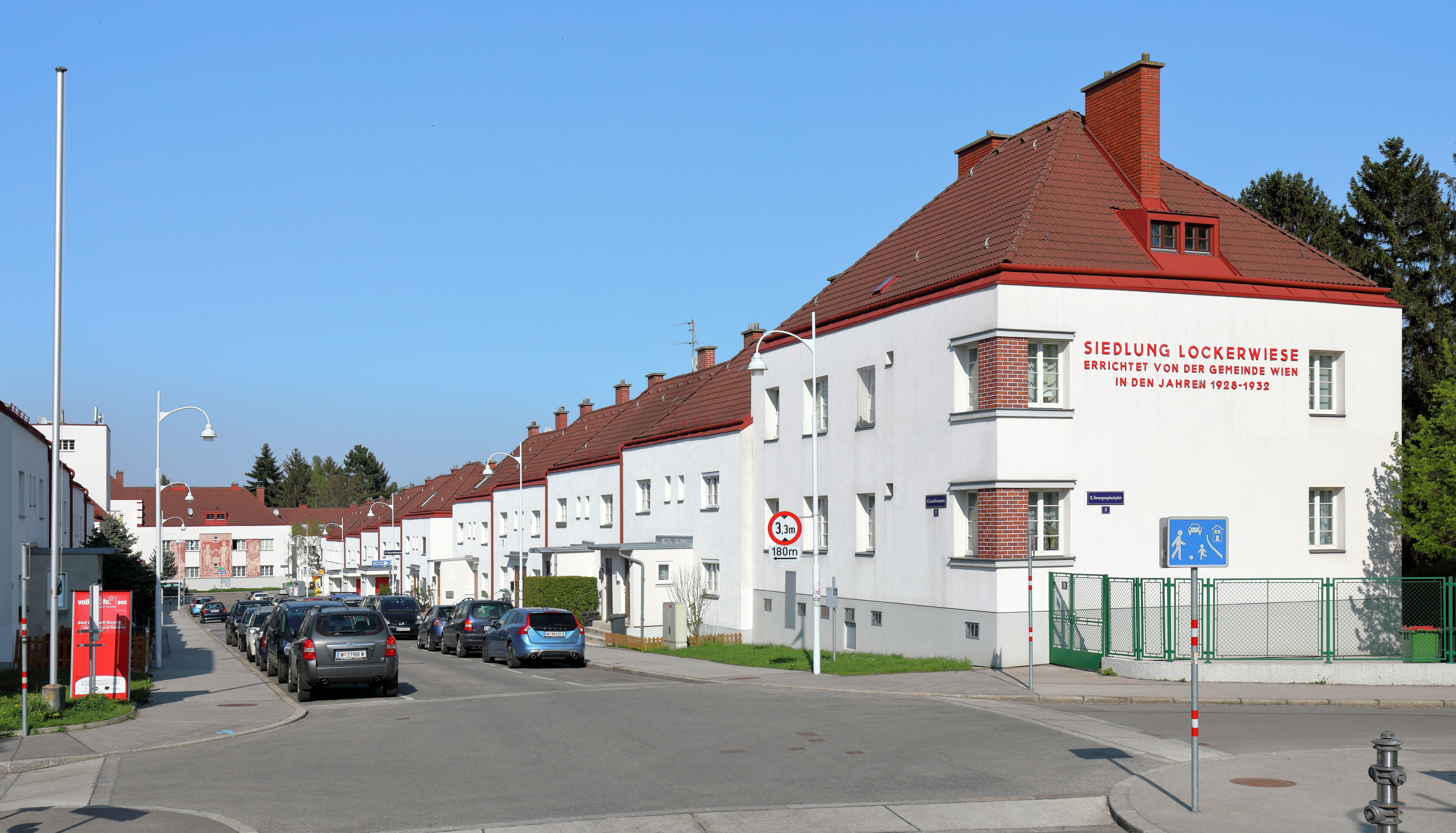 Die Wohnsiedlung Lockerwiese mit rd. 780 Wohneinheiten im Bereich Camillianergasse im 13. Wiener Gemeindebezirk Hietzing.Errichtet wurden die Wohnsiedlung von 1928 bis 1932 durch die Gemeinde Wien nach Plänen des Architekten Karl Schartelmüller. 1938 erfolgte eine Erweiterung im Nordwesten um 120 Reihenhäuser und einen Block mit Wohnungen. This media shows the Vienna residential building (Gemeindebau) with the ID 60.